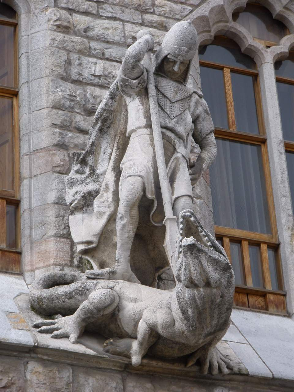 León - Casa de Botines